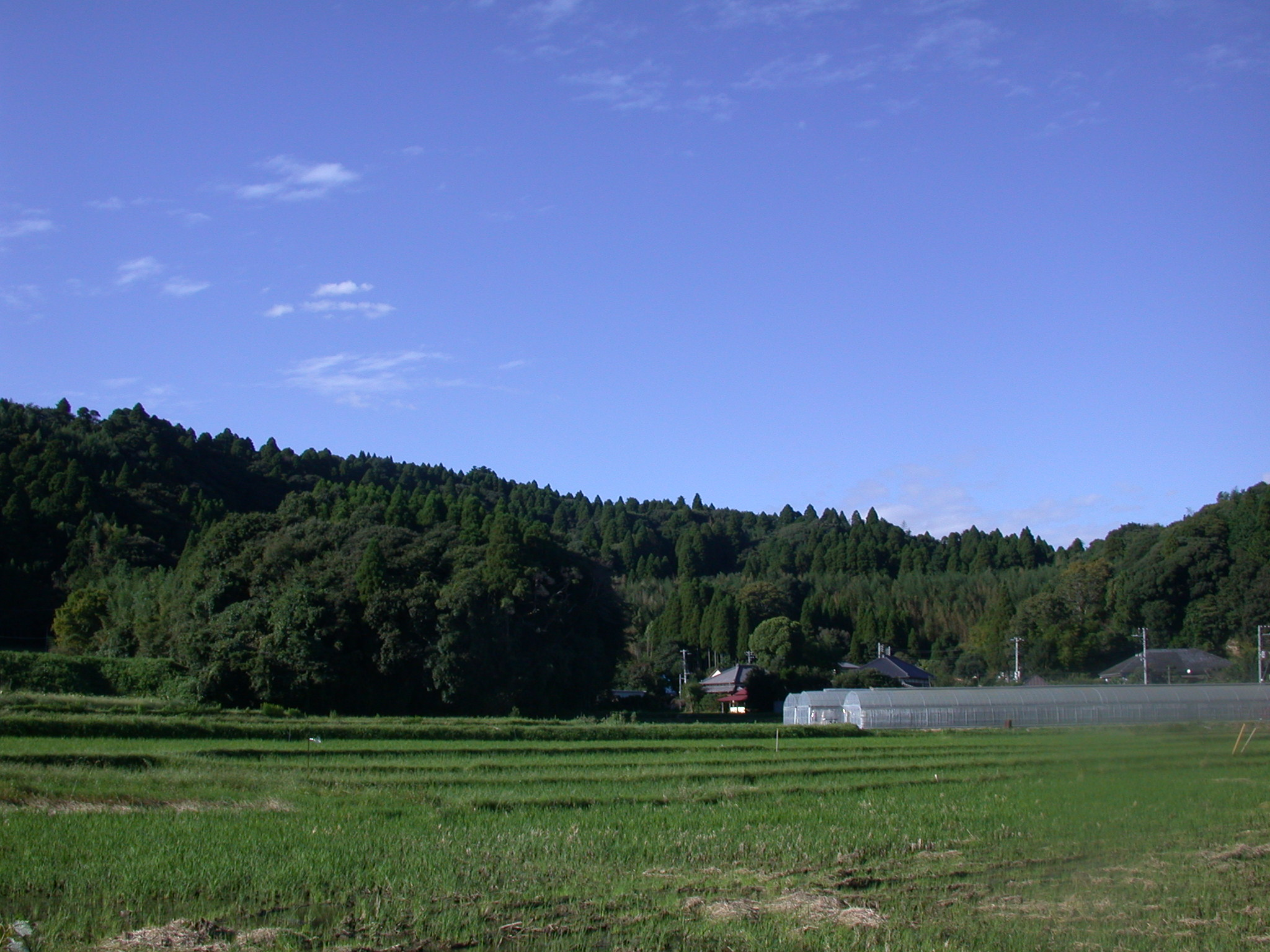 Toke Castle